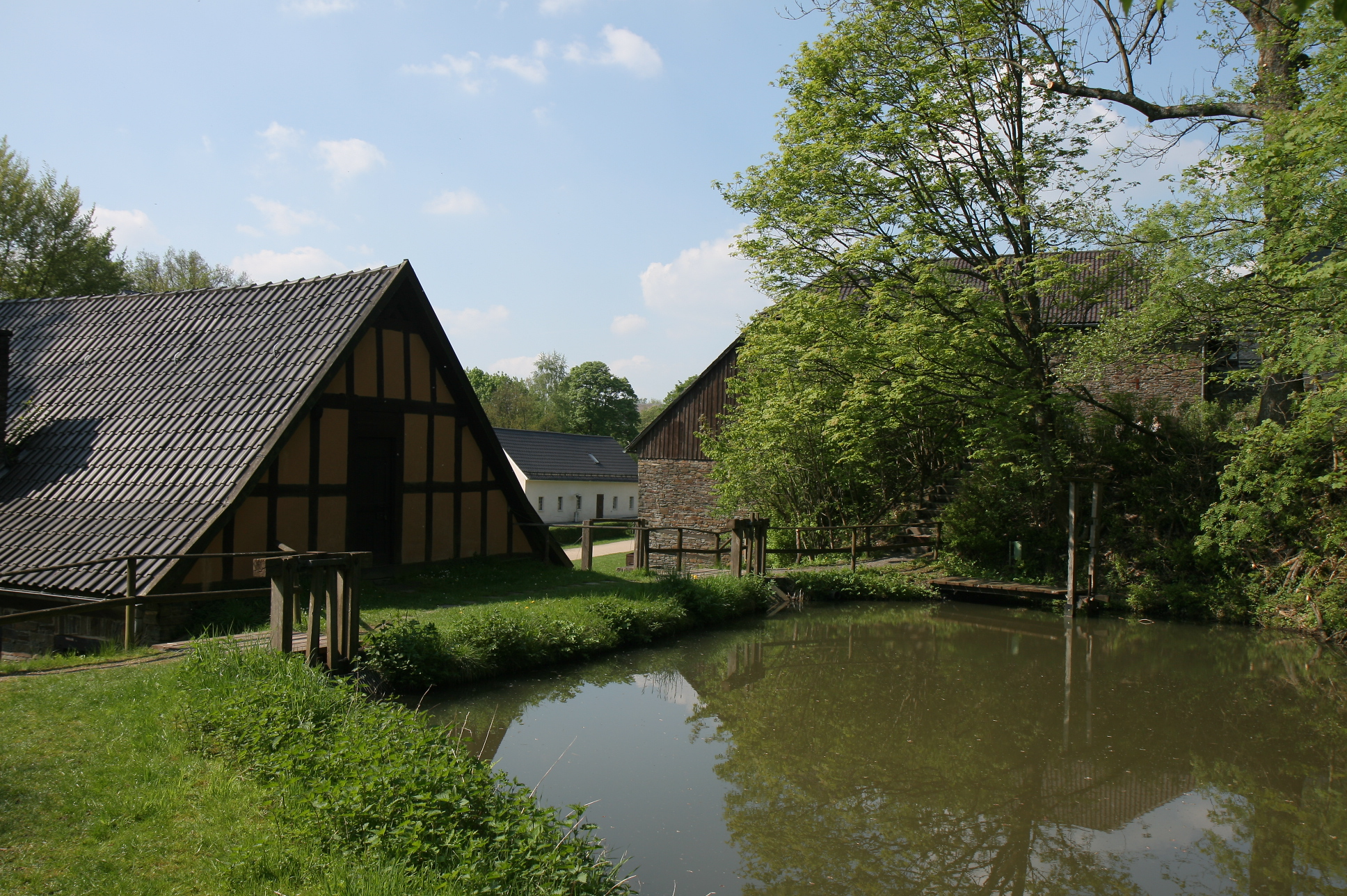 Teich hinter dem Hammerwerk. Museum Wendener Hütte in Wenden.